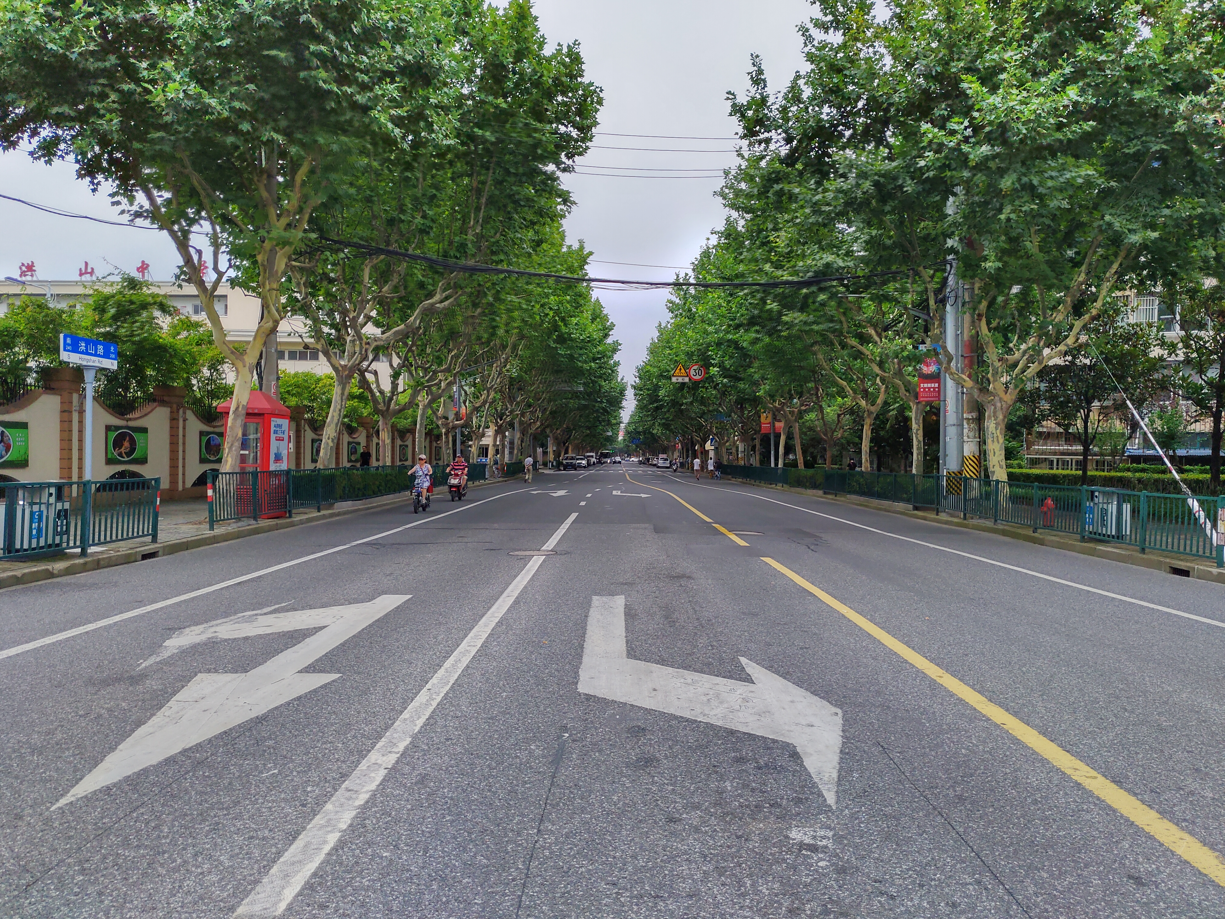 洪山路街景 2020 上海